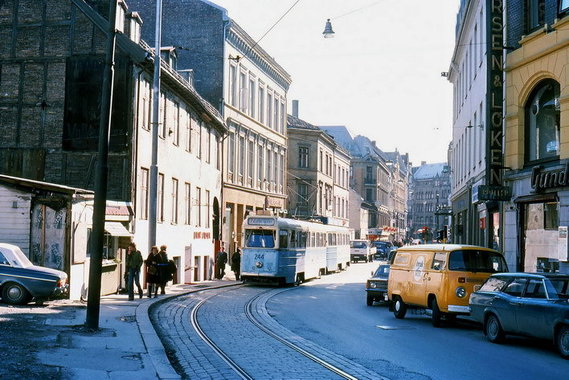 Nedre del av Pilestredet på 1970-tallet. Peckelgården foran trikken til venstre, der Ring 1 går under jorda ved Ibsengarasjen.